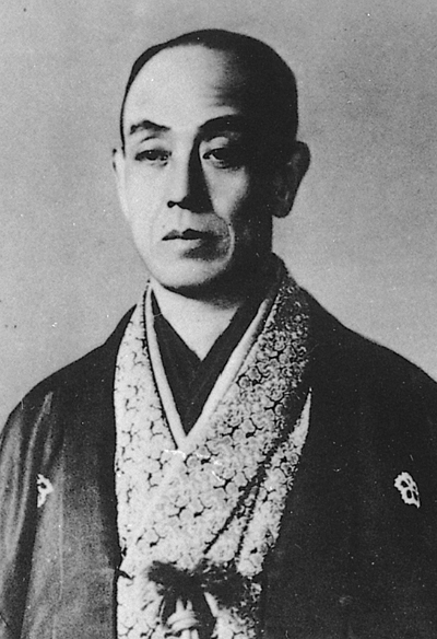 Portrait of Ichikawa Sadanji I (初代市川左団次, 1842 – 1909)